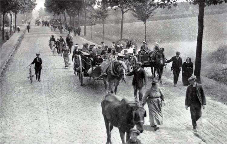 Belgian refugees in 1914